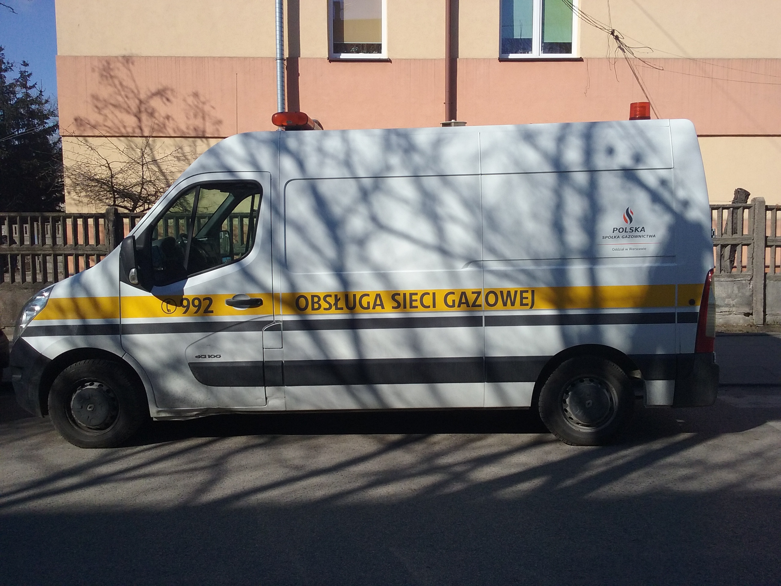 Tomaszów Mazowiecki w województwie łódzkim, PL, EU. Pojazd specjalistyczny Pogotowia Gazowego, ulica Zagajnikowa. CC0